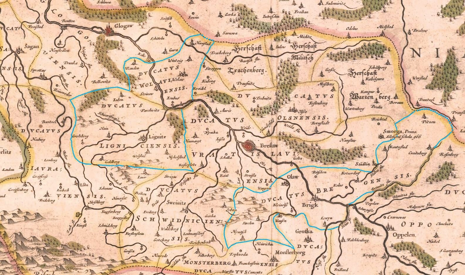 Borders of Legnica-Wołów-Brzeg Duchy in XVII century